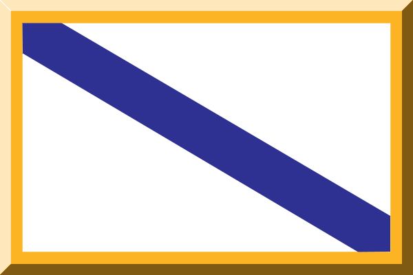 C:\Users\Romina\Pictures